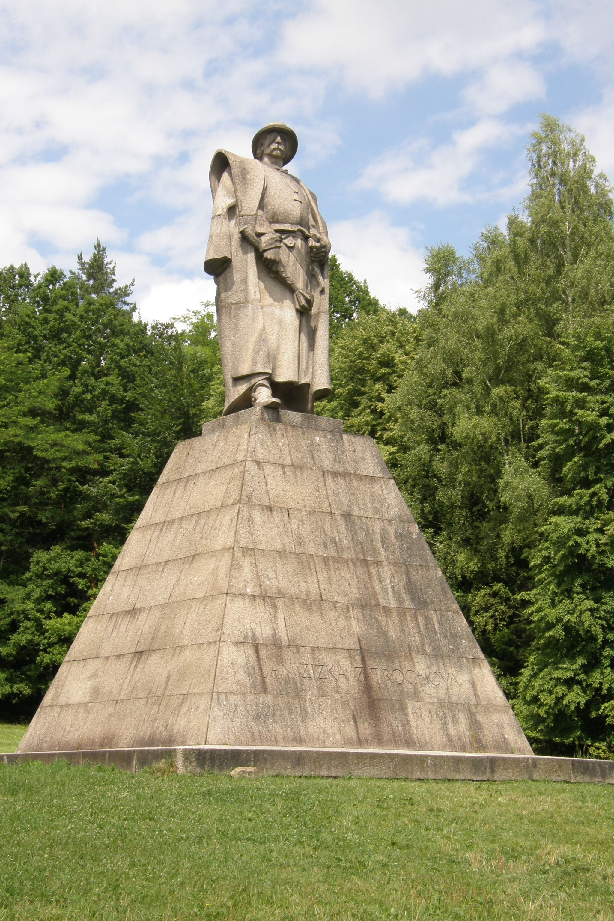 Dvorec - areál rodiště Jana Žižky z Trocnova, část stojící a archeologické stopy (Trocnov), Trocnov 14